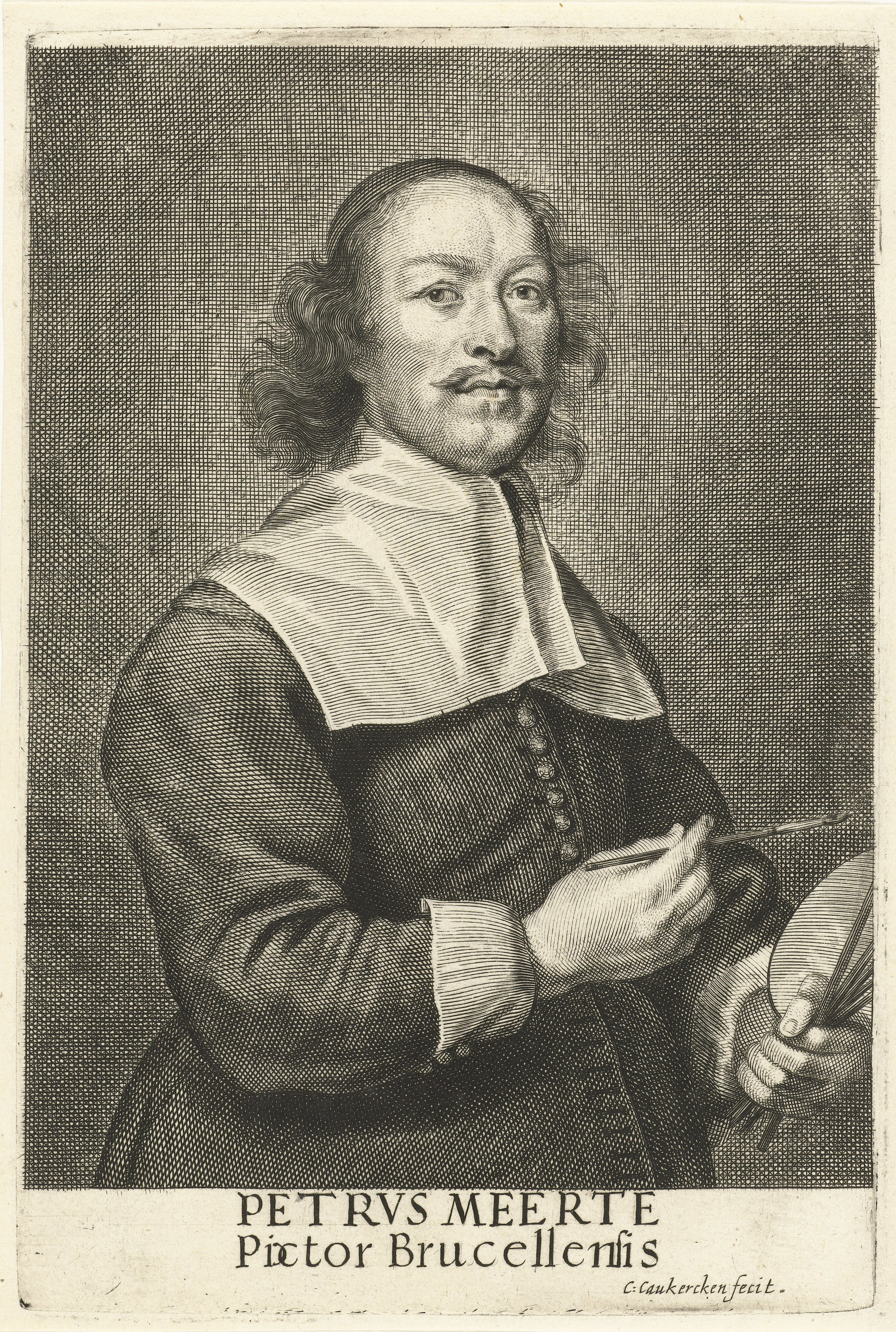 IdentificatieTitel(s): Portret van de schilder Petrus MeerteObjecttype: prent Objectnummer: RP-P-OB-7110Catalogusreferentie: Hollstein Dutch 18FMP 3530Opschriften / Merken: verzamelaarsmerk, verso, gestempeld: Lugt 2228VervaardigingVervaardiger: prentmaker: Cornelis van Caukercken (vermeld op object)Plaats vervaardiging: Zuidelijke NederlandenDatering: ca. 1640 - 1680Fysieke kenmerken: gravureMateriaal: papier Techniek: graveren (drukprocedé)Afmetingen: plaatrand: h 195 mm × b 130 mmOnderwerpWat: painter at work, in his studioWie: Peeter MeerteVerwerving en rechtenVerwerving: onbekendCopyright: Publiek domein